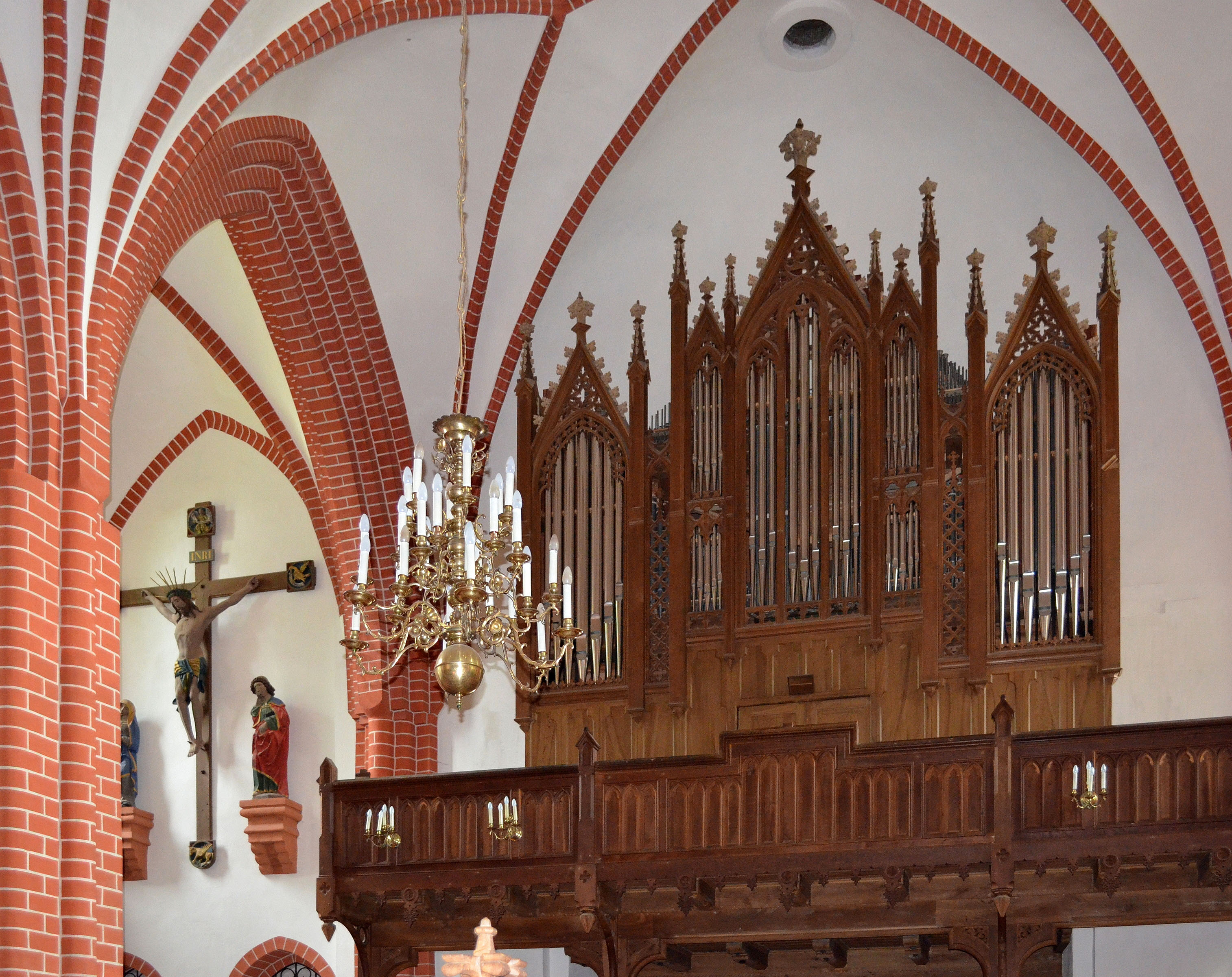 Röbel, Marienkirche, die Orgel 1